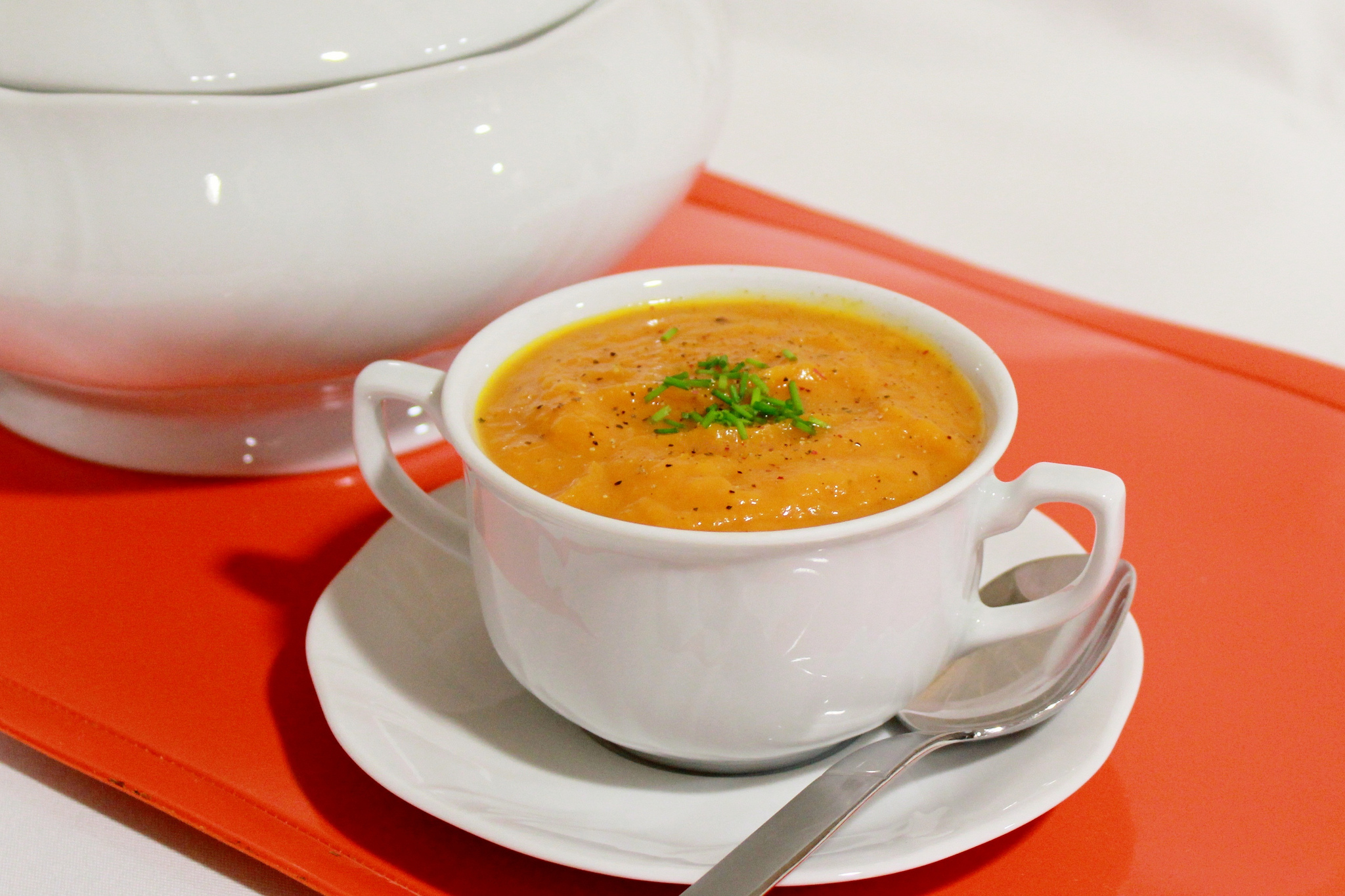 Crema de calabaza asada.